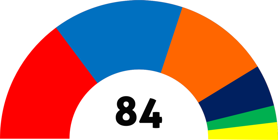 Distribución Asamblea Legislativa de El Salvador